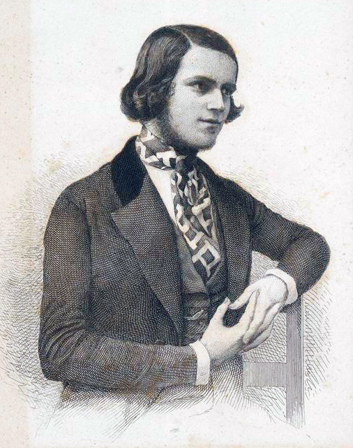 Italo Gardoni jeune homme